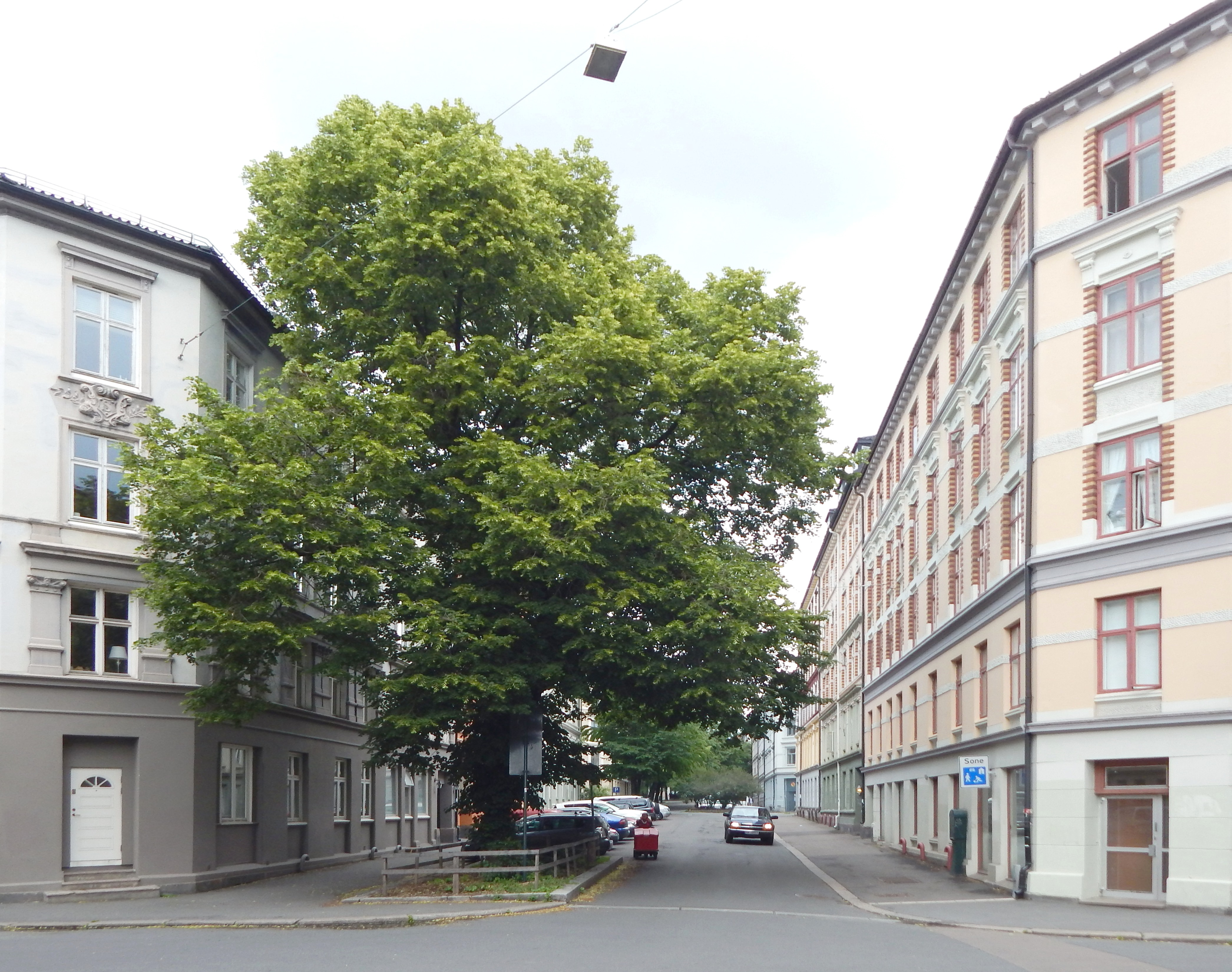 Sverdrups gate